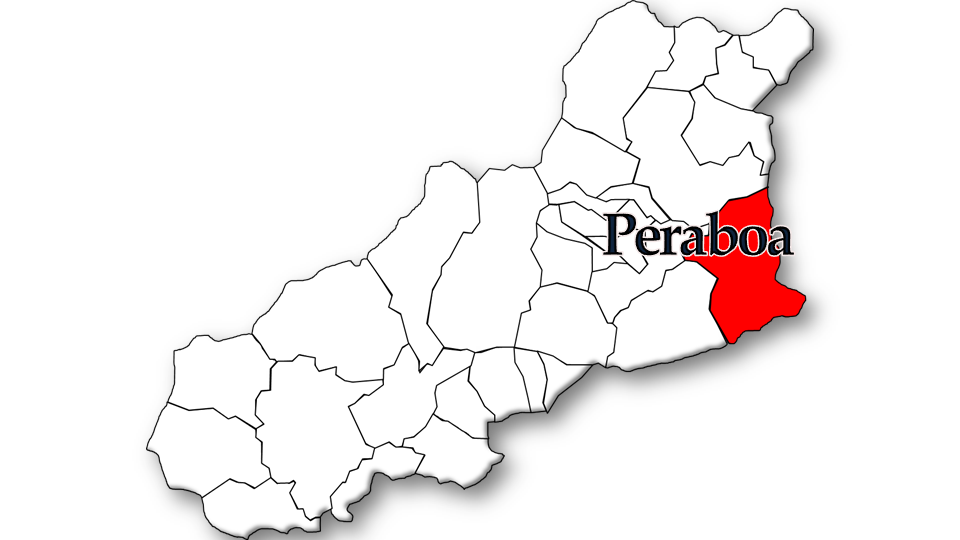 População